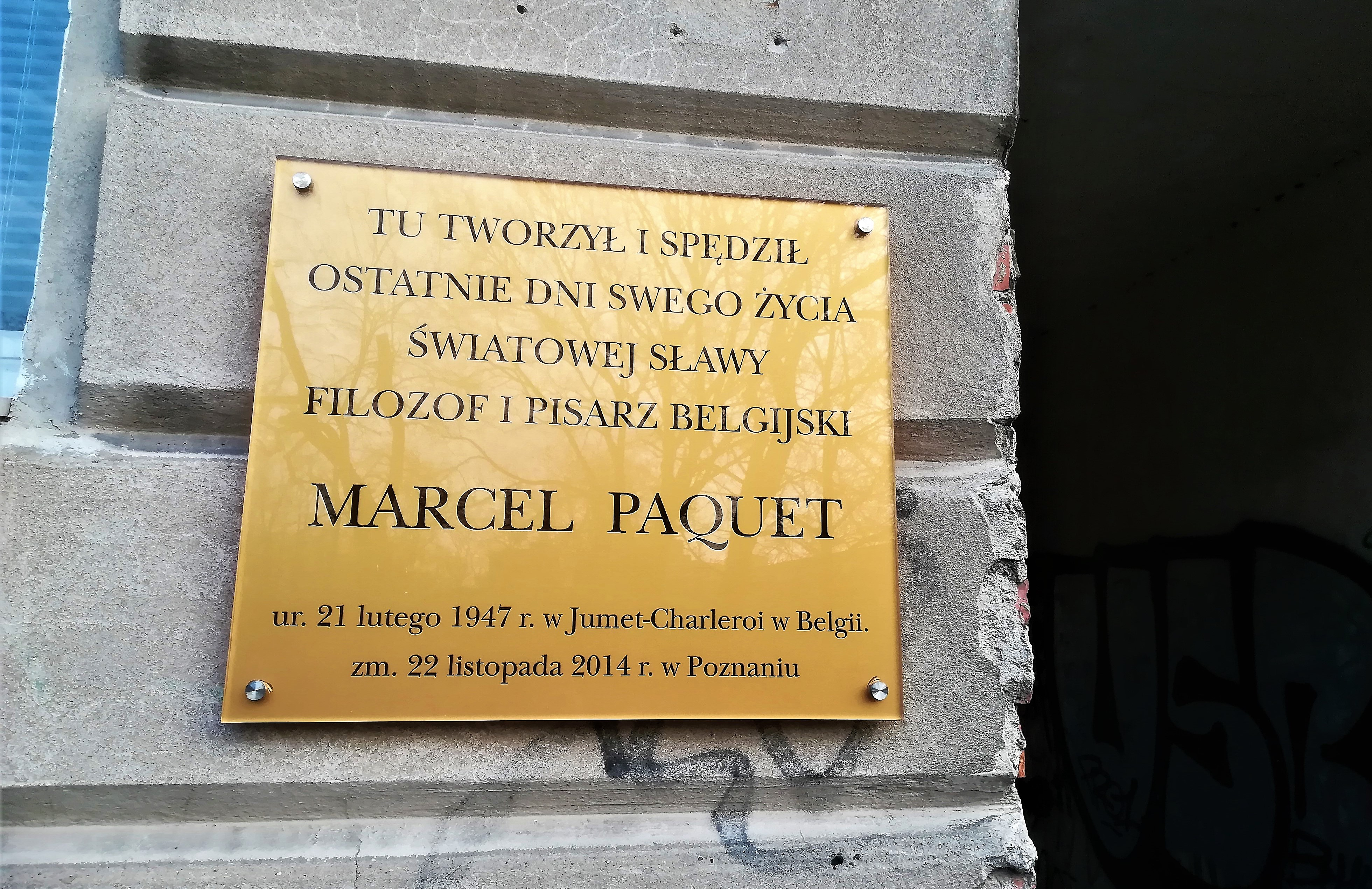 Tablica ku czci Marcela Paqueta. Poznań - ul. Działowa.